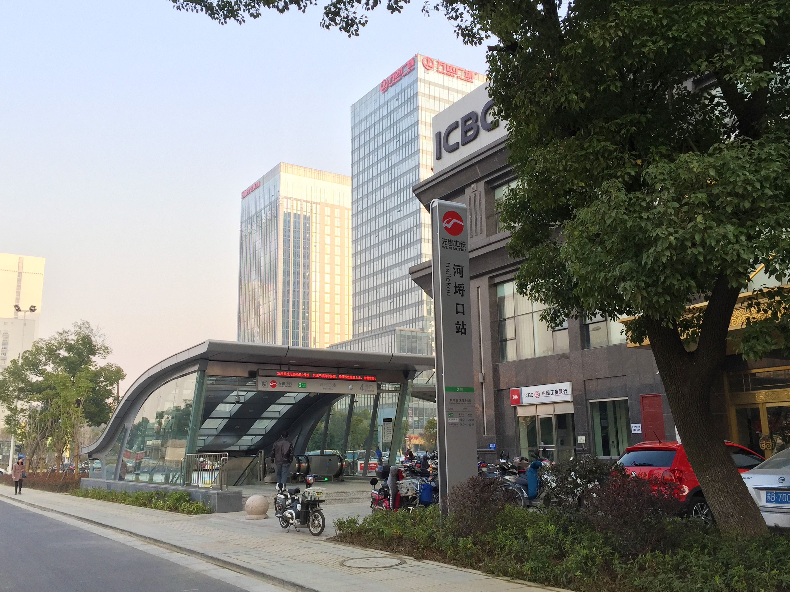 無錫地鐵河埒口站4號口